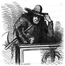 Caricature de Jean-Martial Bineau (1805-1855) déguisé en bûcheron, par Cham.